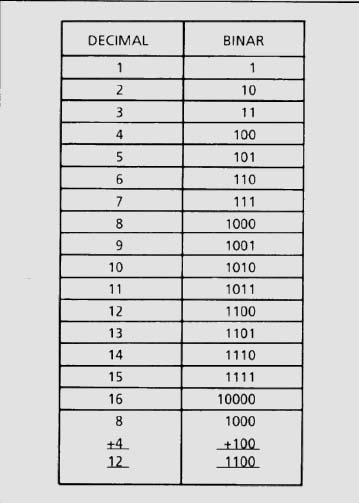 no orig. desc.